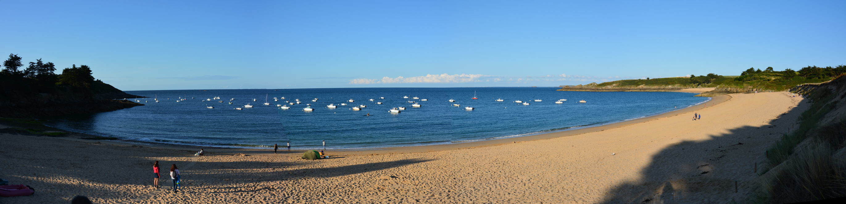 Plage du Port à Saint-Coulomb Ille et Vilaine Bretagne